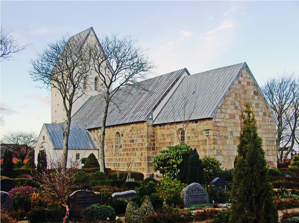 fra sydøst